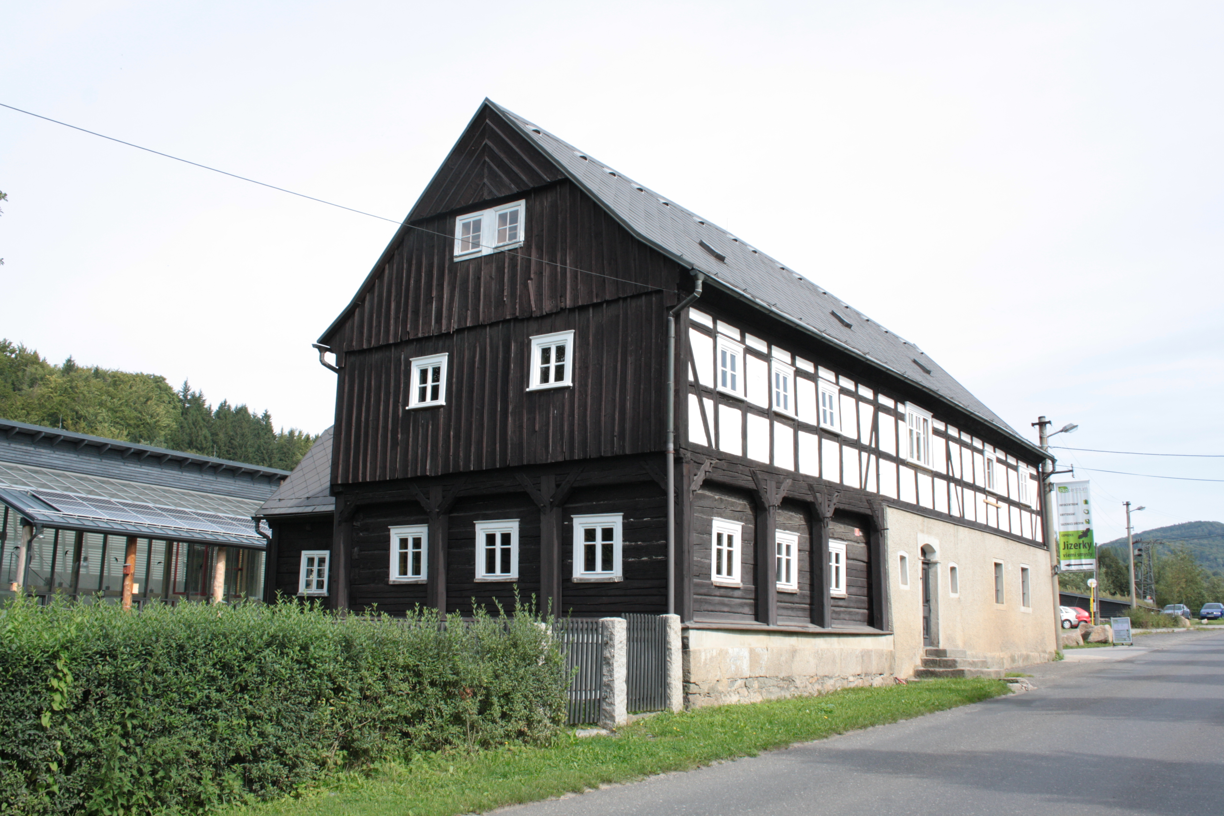 This photograph was taken with a DSLR from WMCZ's Camera grant. Bývalý zájezdní hostinec, dnes Ekocentrum Střevlík v Oldřichově v Hájích (pohled od jihu)